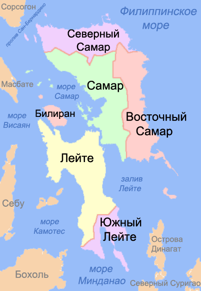 Карта провинций региона Восточные Висайи (Филиппины)